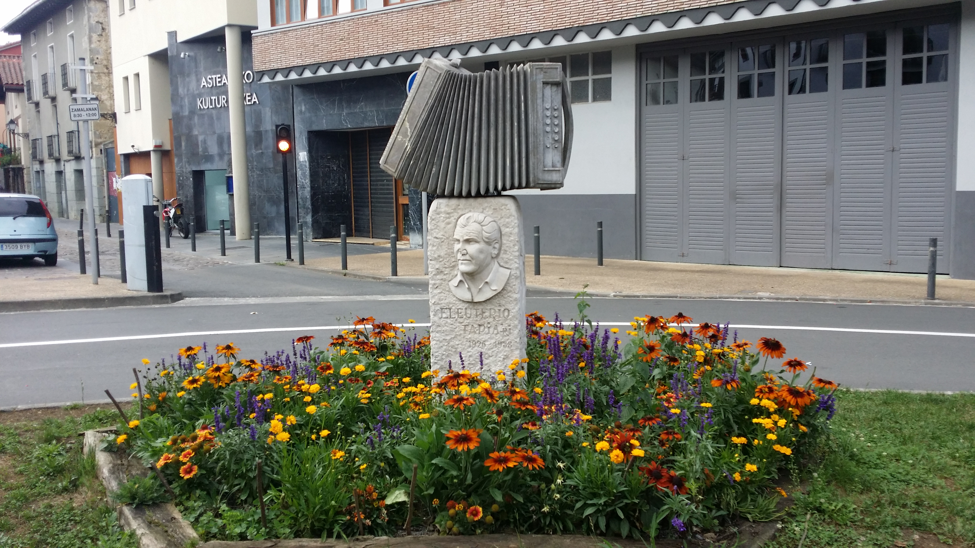 Eleuterio Tapiarena omenezko eskultura Asteasun